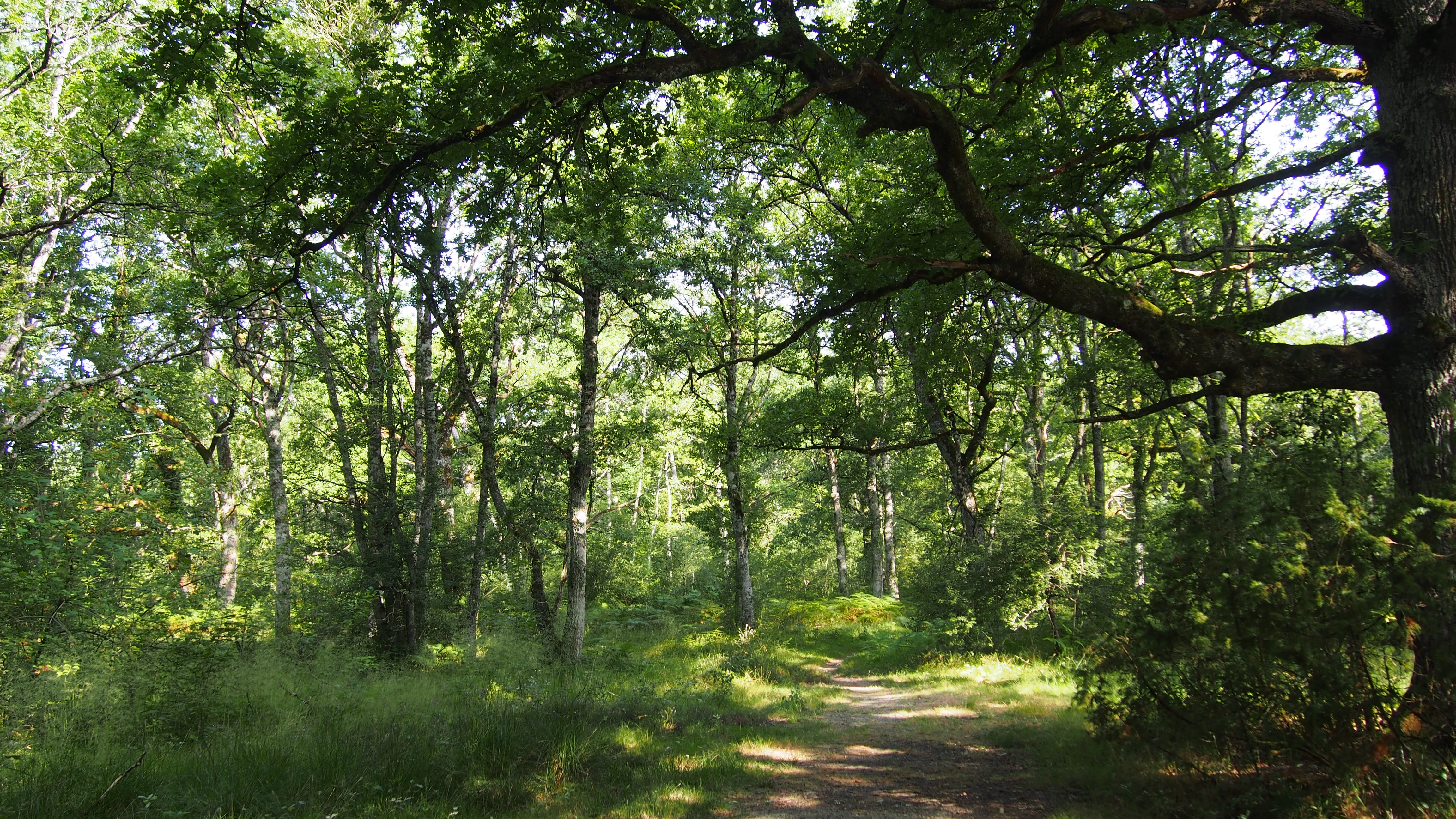 Orgiko hariztia, Lizason, Ultzaman.